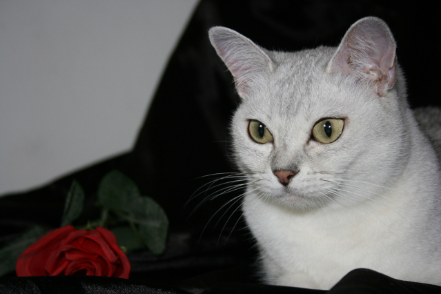 Zucht- und Showkatze der Cattery "of Chattahoochee" in der Variante Black-silver-shaded "Olivia af Misapotanien"